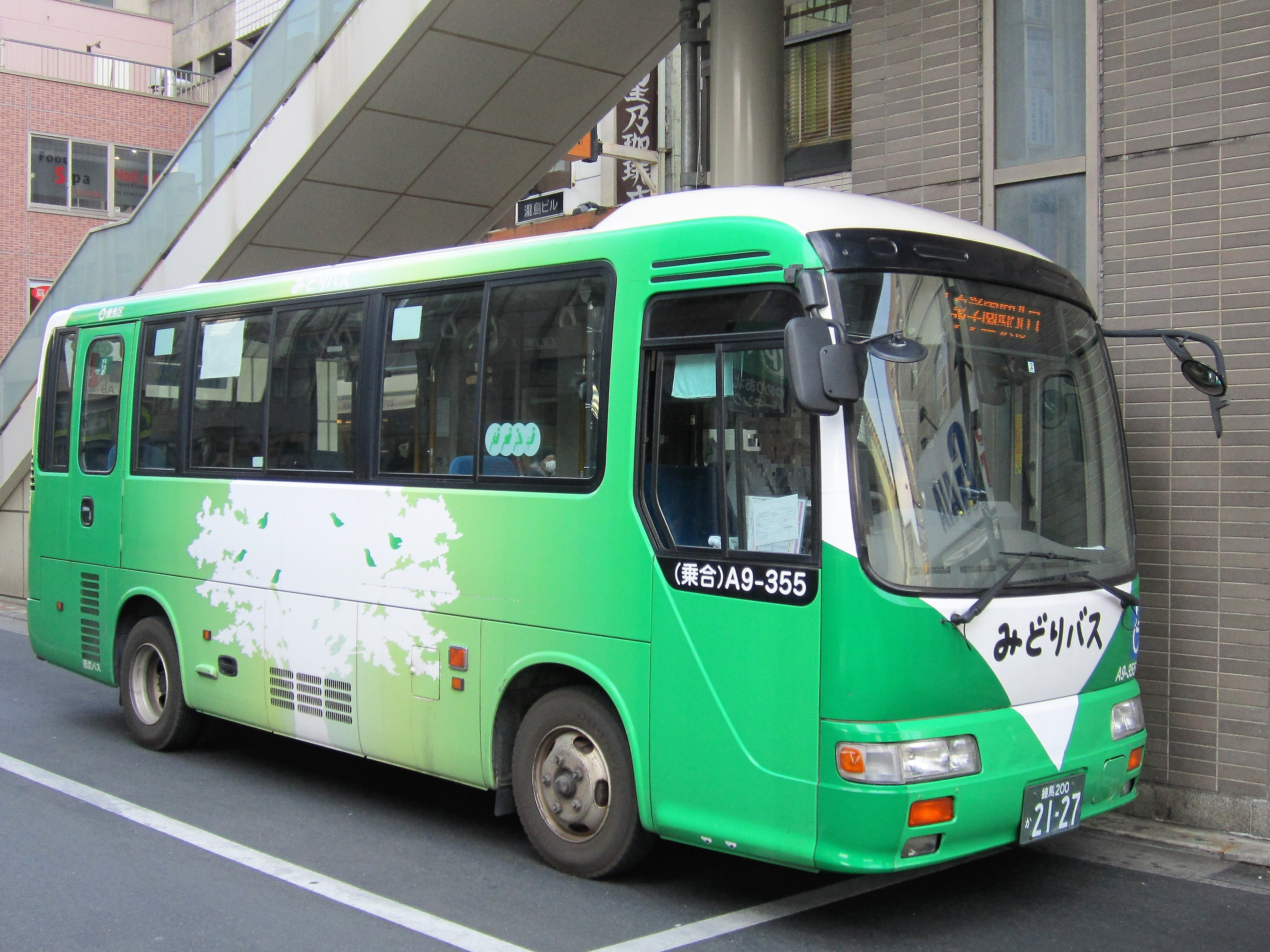 大泉学園駅北口付近に停車中のみどりバス（西武バス車） Canon PowerShot A2200